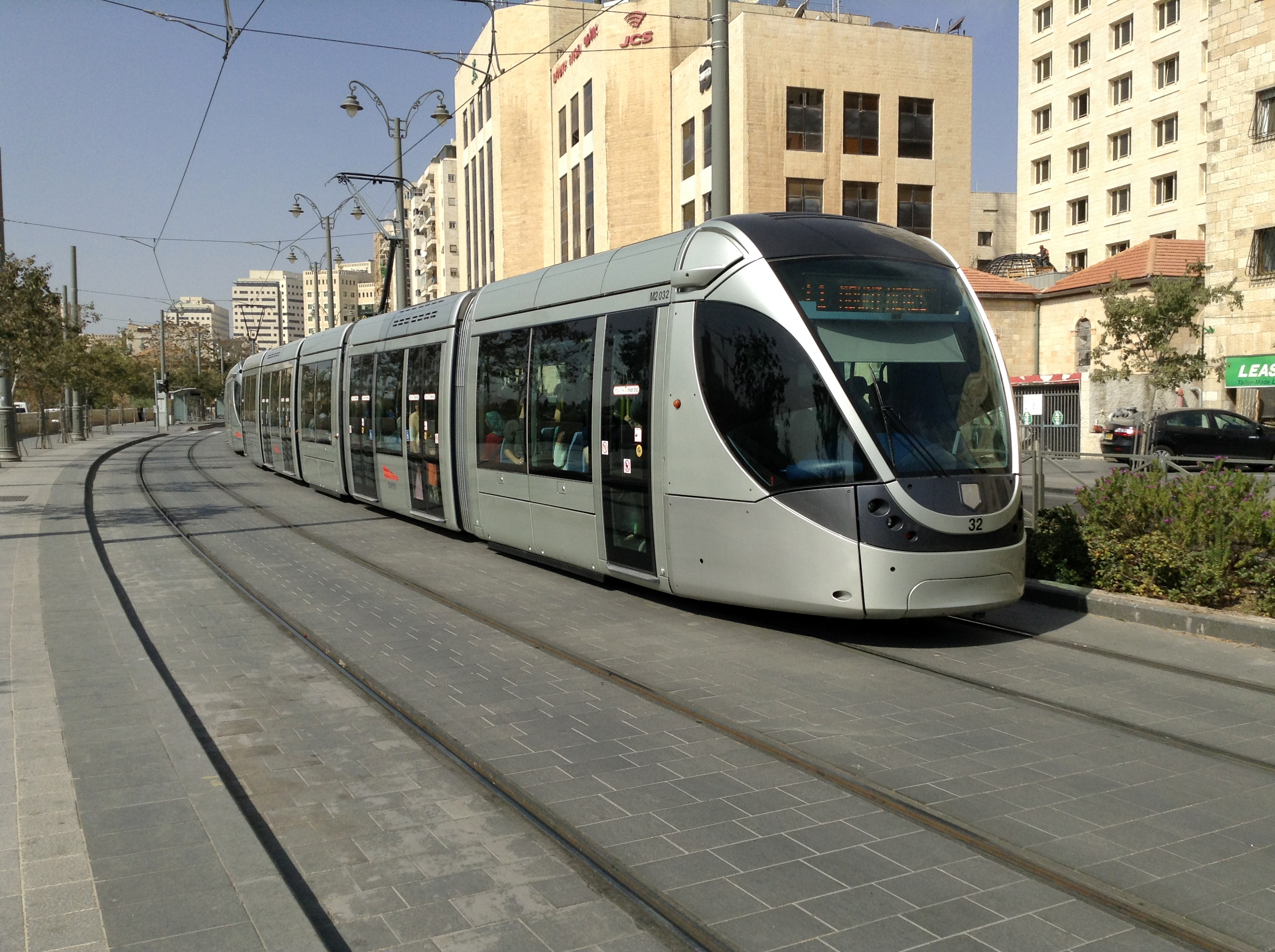 Иерусалимский трамвай на ул. Яффо.